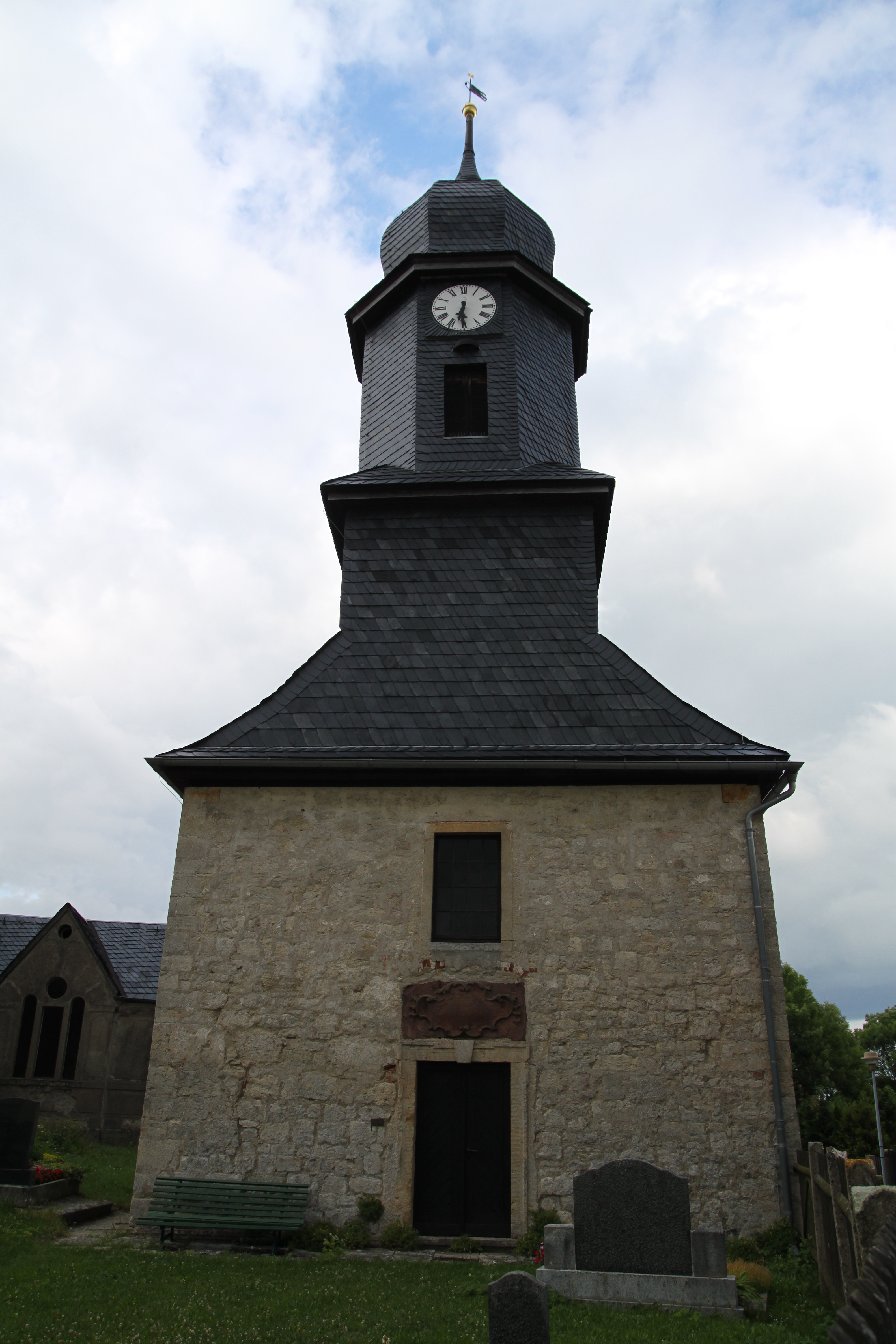 Dorfkirche in Schorba